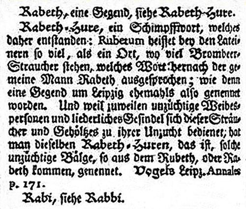 „Rabet-Hure“. Eintrag in Zedlers Universallexikon Band 30 von 1741